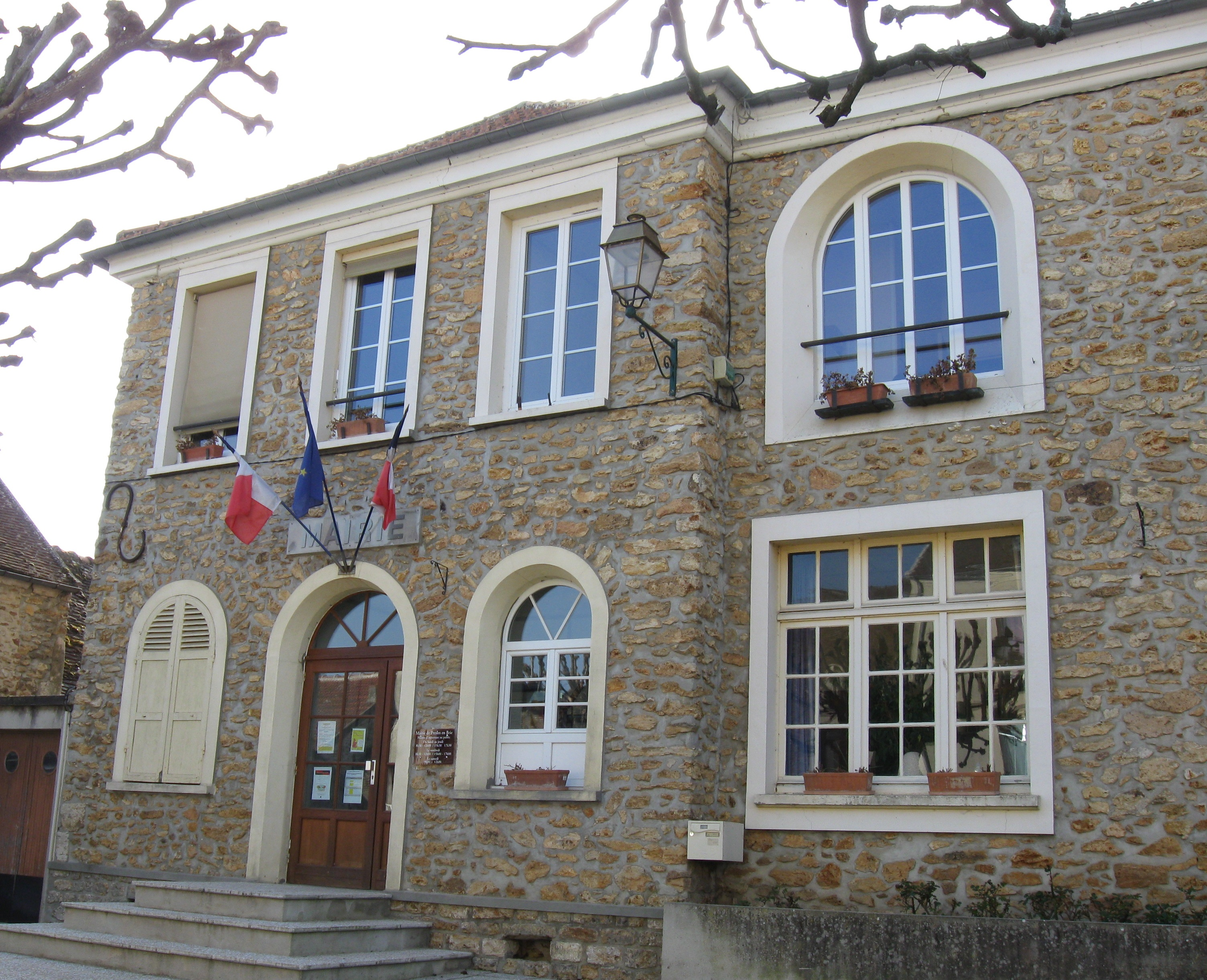 Mairie de Presles-en-Brie. (Seine-et-Marne, région Île-de-France).